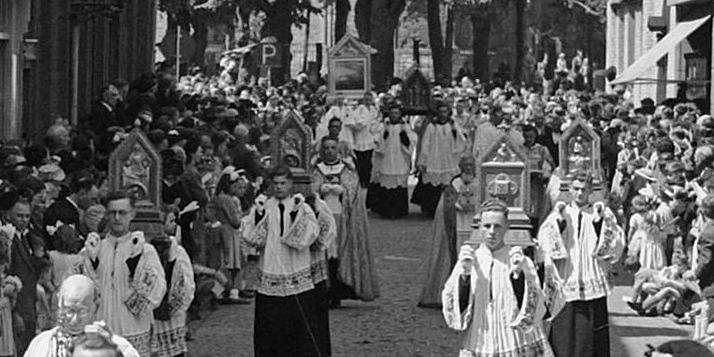 Collectie / Archief : Fotocollectie Anefo Reportage / Serie : [ onbekend ] Beschrijving : St. Servaasprocessie te Maastricht Borstbeeld St. Servaas. Door de Bredestraat Datum : 17 mei 1948 Locatie : Maastricht Trefwoorden : processies Fotograaf : Moedrik, D. / Anefo, [onbekend] Auteursrechthebbende : Nationaal Archief Materiaalsoort : Glasnegatief Nummer archiefinventaris : bekijk toegang 2.24.01.09 Bestanddeelnummer : 902-7483